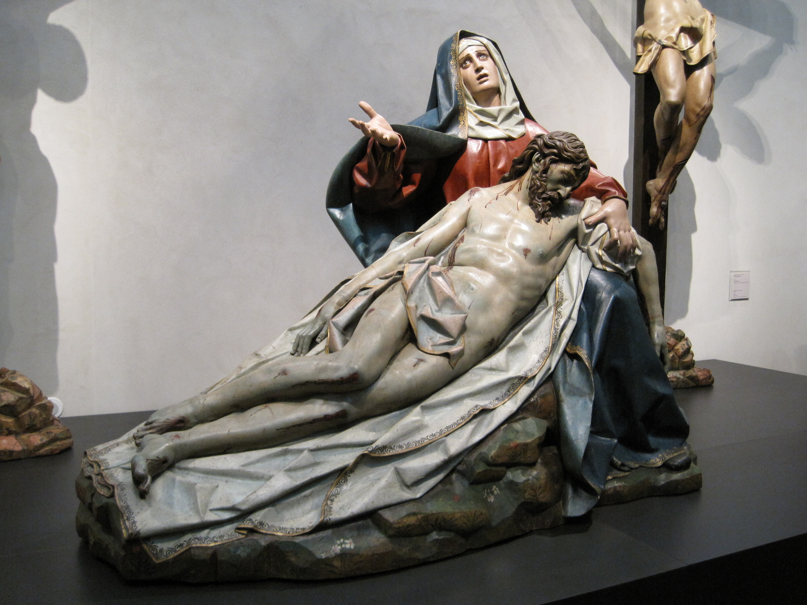 La Sexta Angustia (1616-1617), obra de Gregorio Fernández. Procede de la Cofradía de Nuestra Señora de las Angustias de Valladolid. Museo Nacional Colegio de San Gregorio, Valladolid (España).